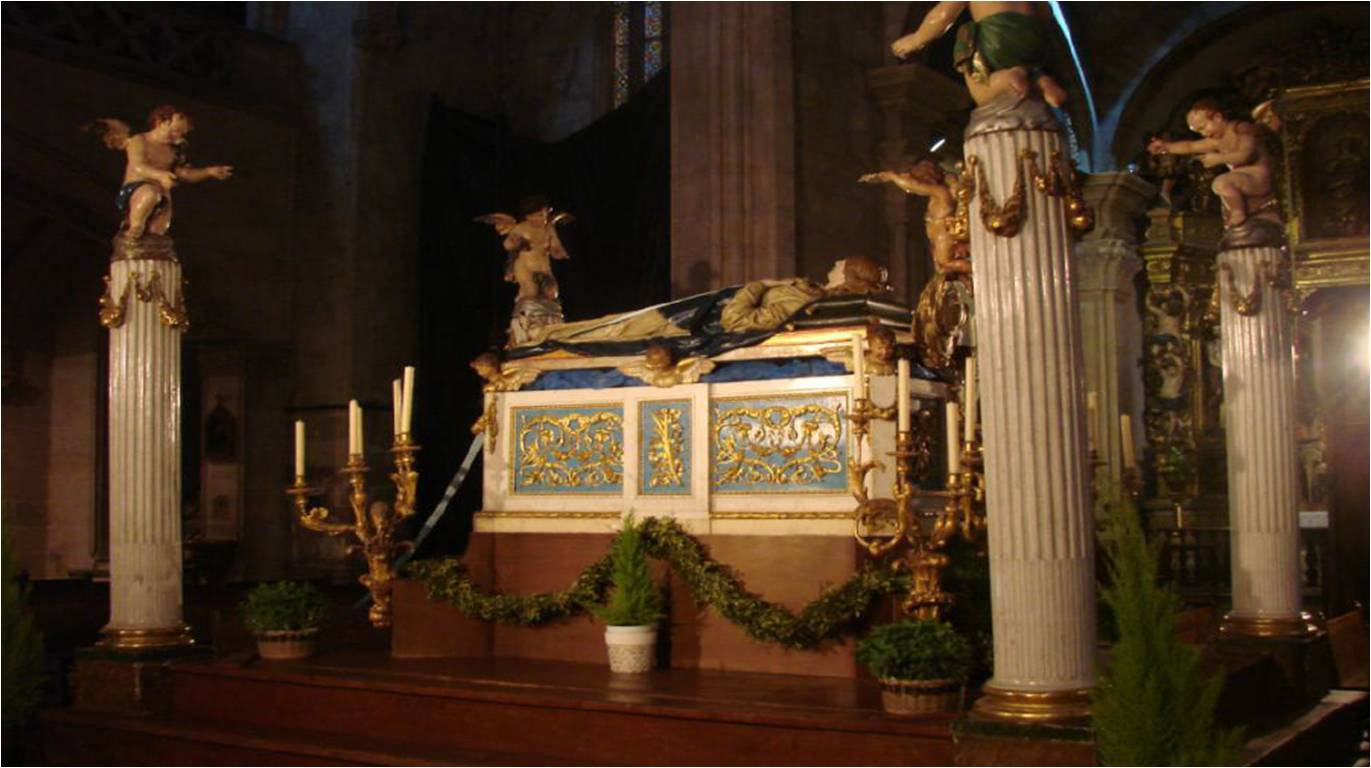 Llit